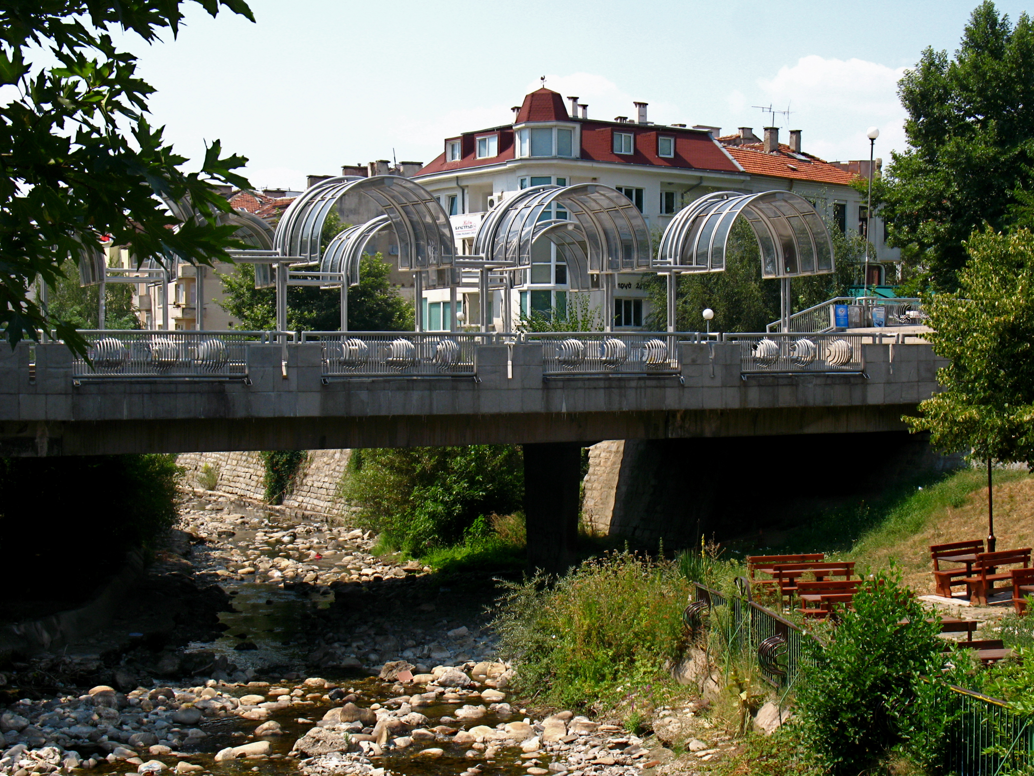 Река Бистрица в Благоевград. Изглед от ул. „Александър Стамболийски“.